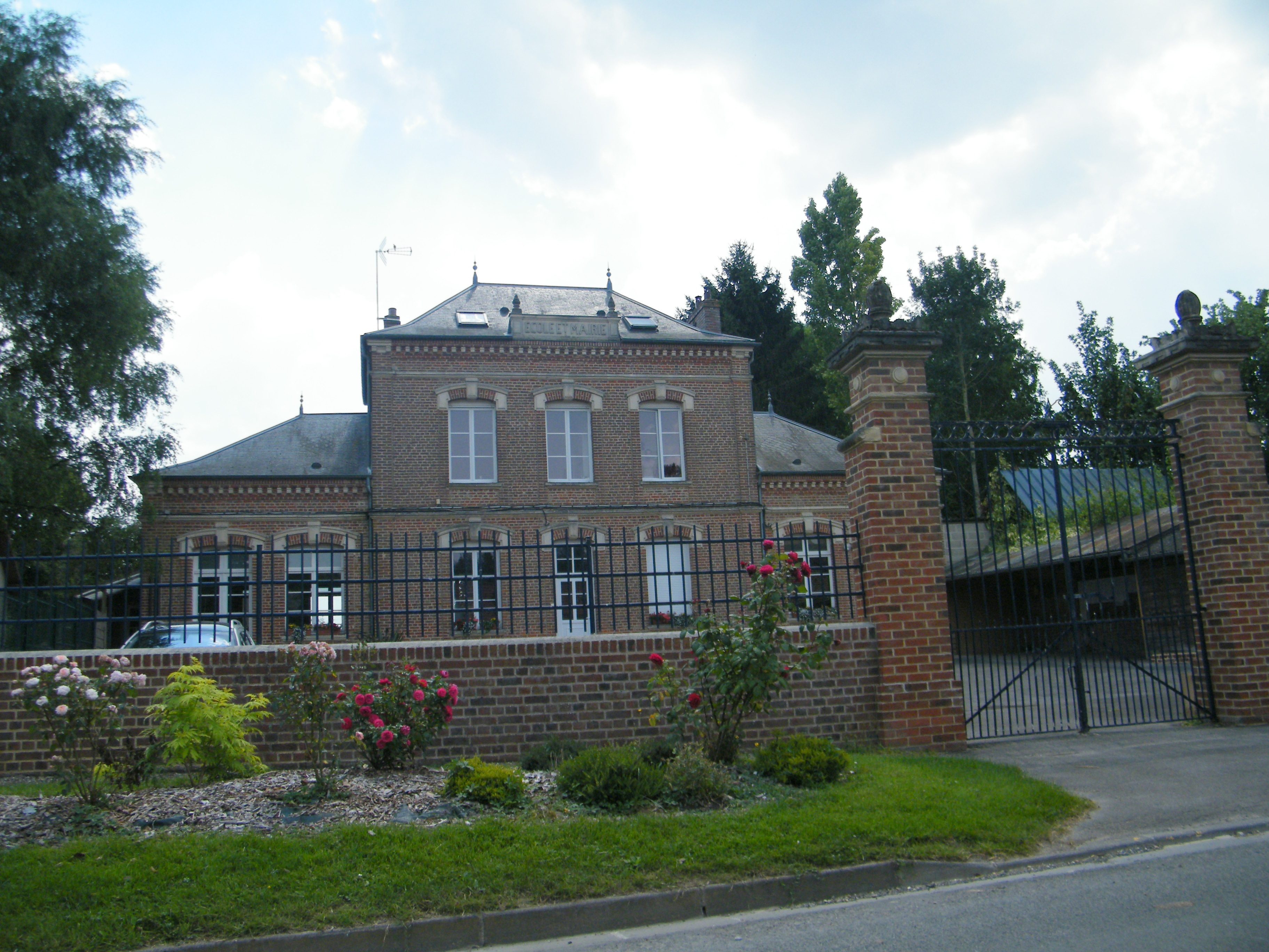 Mairie-école.